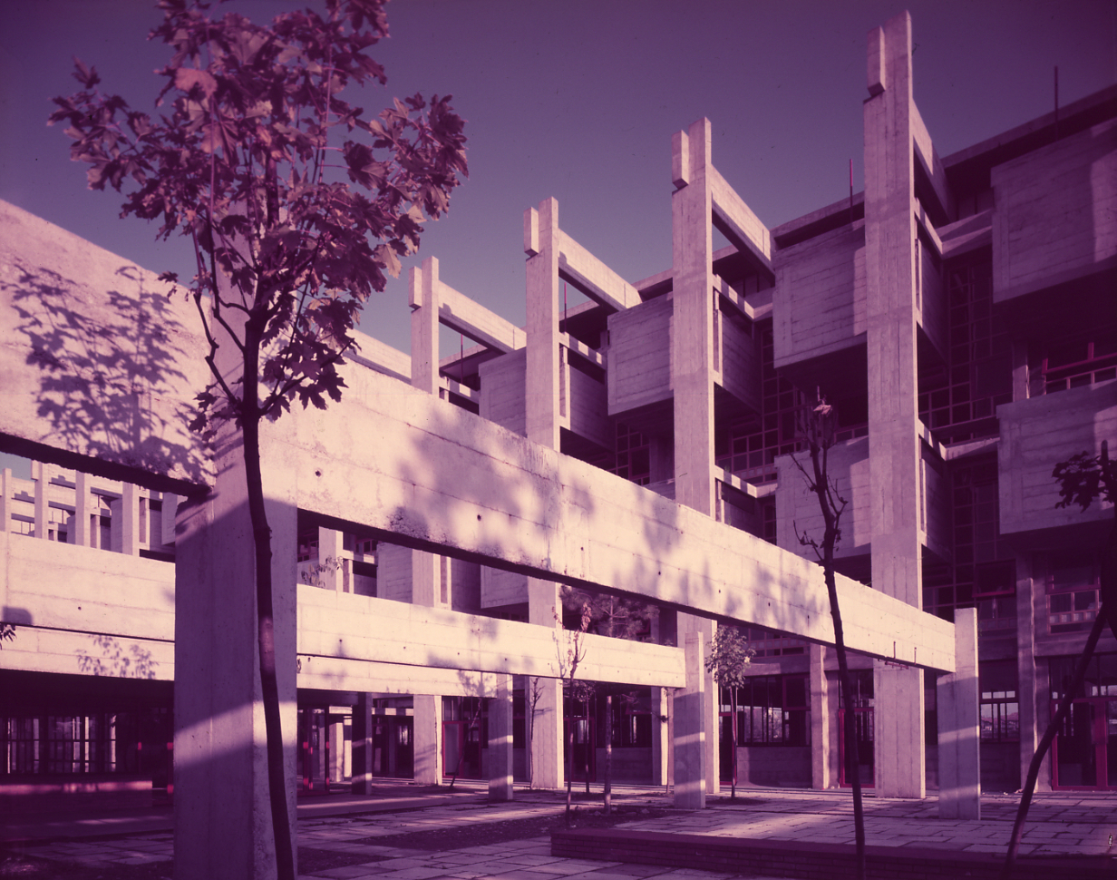 Servizio fotografico : Milano, 1975 / Paolo Monti. - Buste: 4, Fototipi: 4 : Diapositiva, sviluppo cromogeno/ pellicola ; 10x12. - ((Serie costituita da 4 diapositive identificate con i nn.: 493-496. La suddetta serie è contenuta nella scatola identificata con la numerazione G471/620.